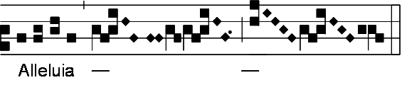 Alléluia de la Vigile de Noël: exemple de mode ambigü